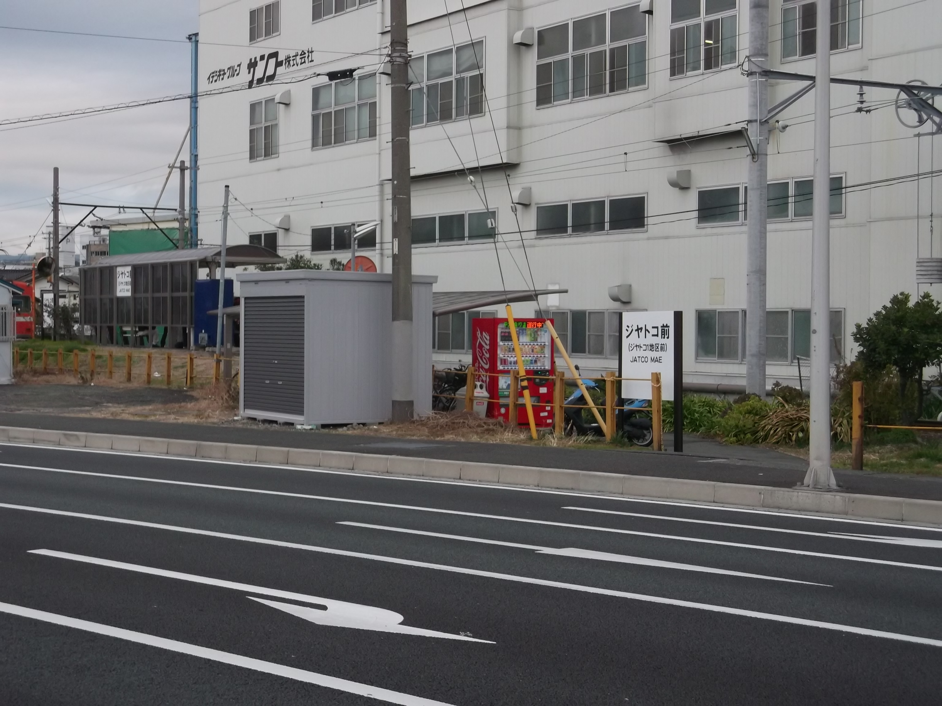 岳南鉄道ジヤトコ前駅